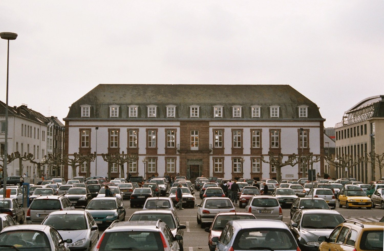 Die ehemalige Kommandantur und der ehemalige Waffenplatz der Festung Saarlouis